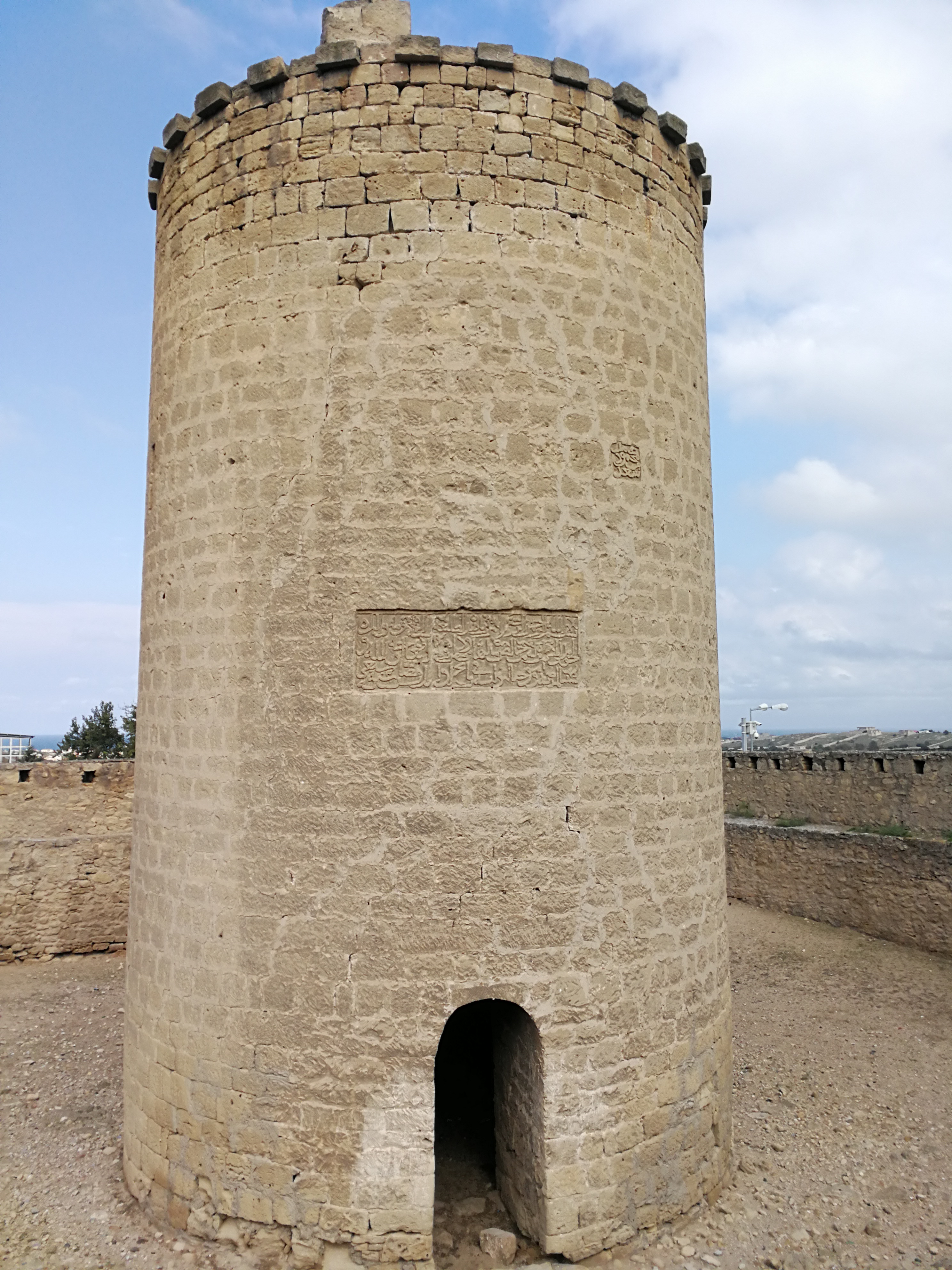 Нардаранская башня. 15 октября 2017 года.